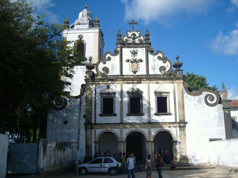 Convento e Igreja de Santo Antônio. Neste mesmo prédio, há o Museu Pinacoteca de Igarassu.